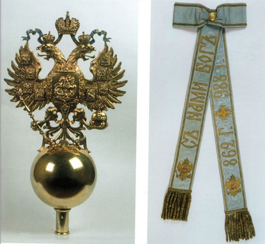 Навершие и ленты государственного знамени России.